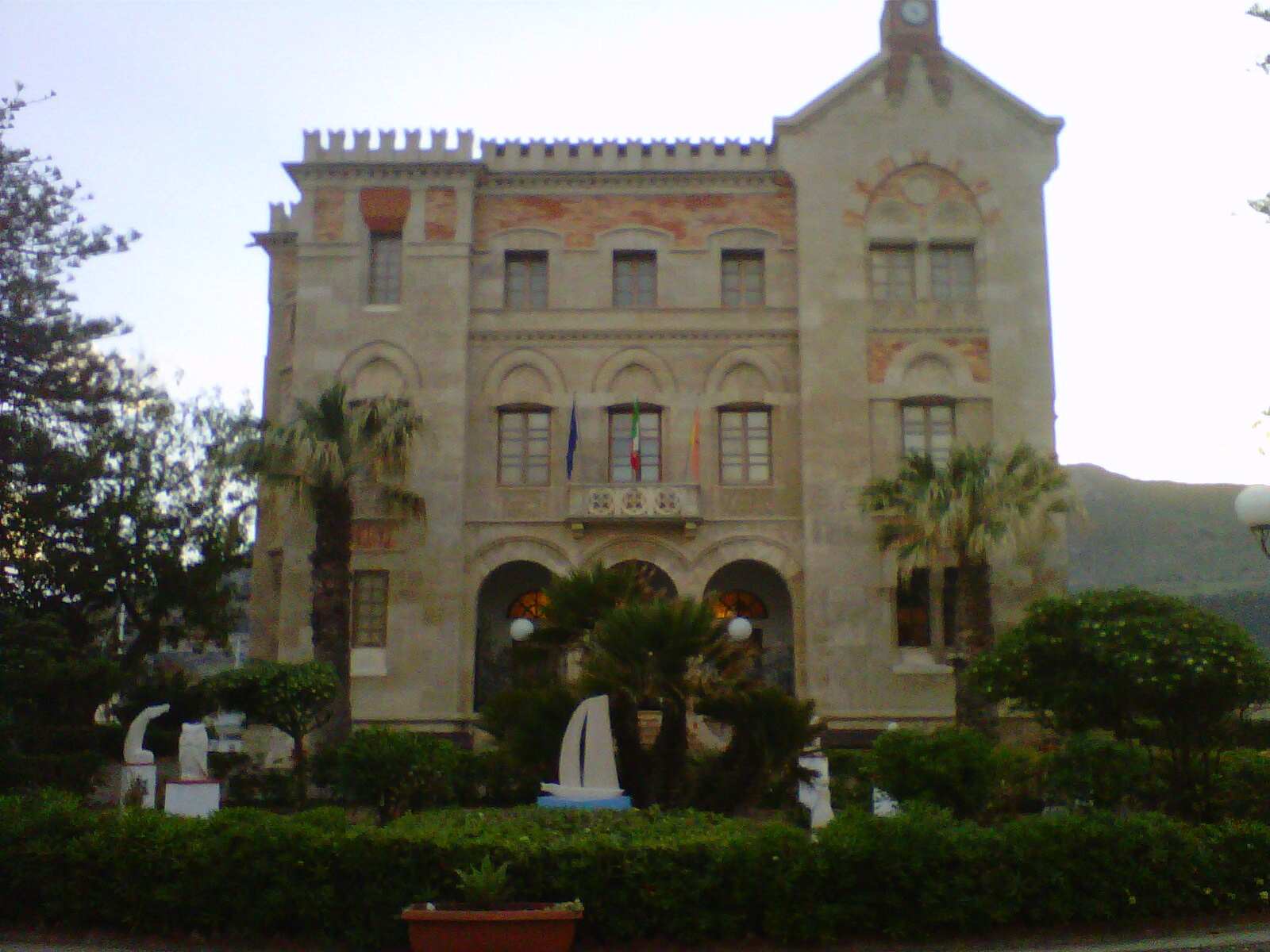 Villa Florio, Favignana, eine der Ägadischen Inseln, Sizilien